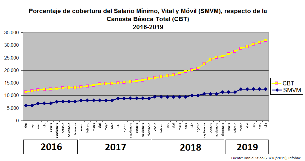 Argentina. Cuadro del salario mínimo, vital y móvil (SMVM) comparado con la Canasta Básica Total (CBT) entre 2016 y 2019. Fuente: Daniel Sticco (23/08/2019), Infobae "El umbral de pobreza del hogar estará en la mesa para definir el nuevo salario mínimo".